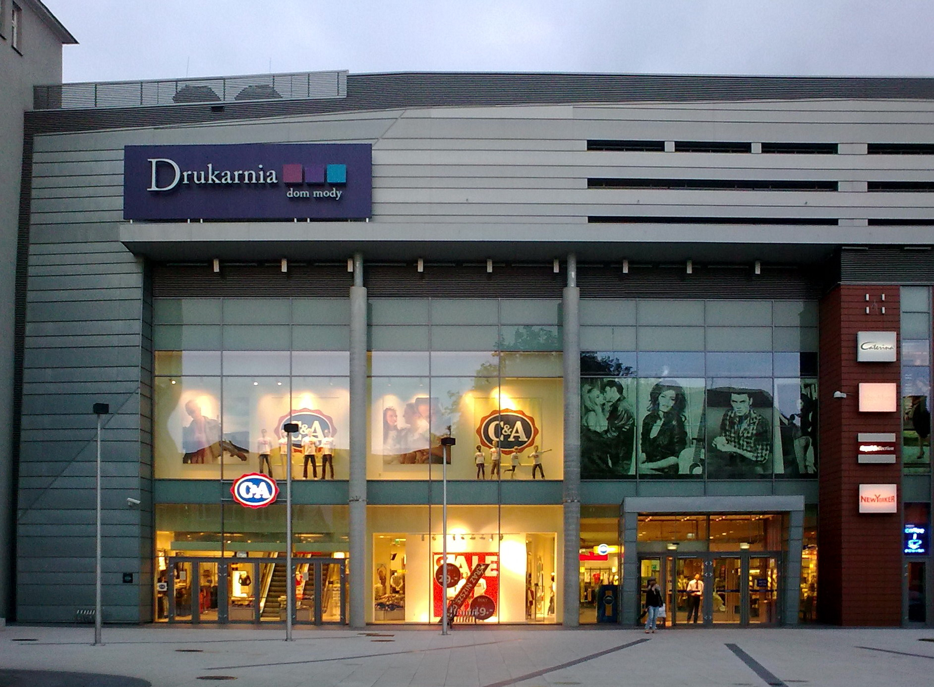 Galeria Drukarnia w Bydgoszczy.